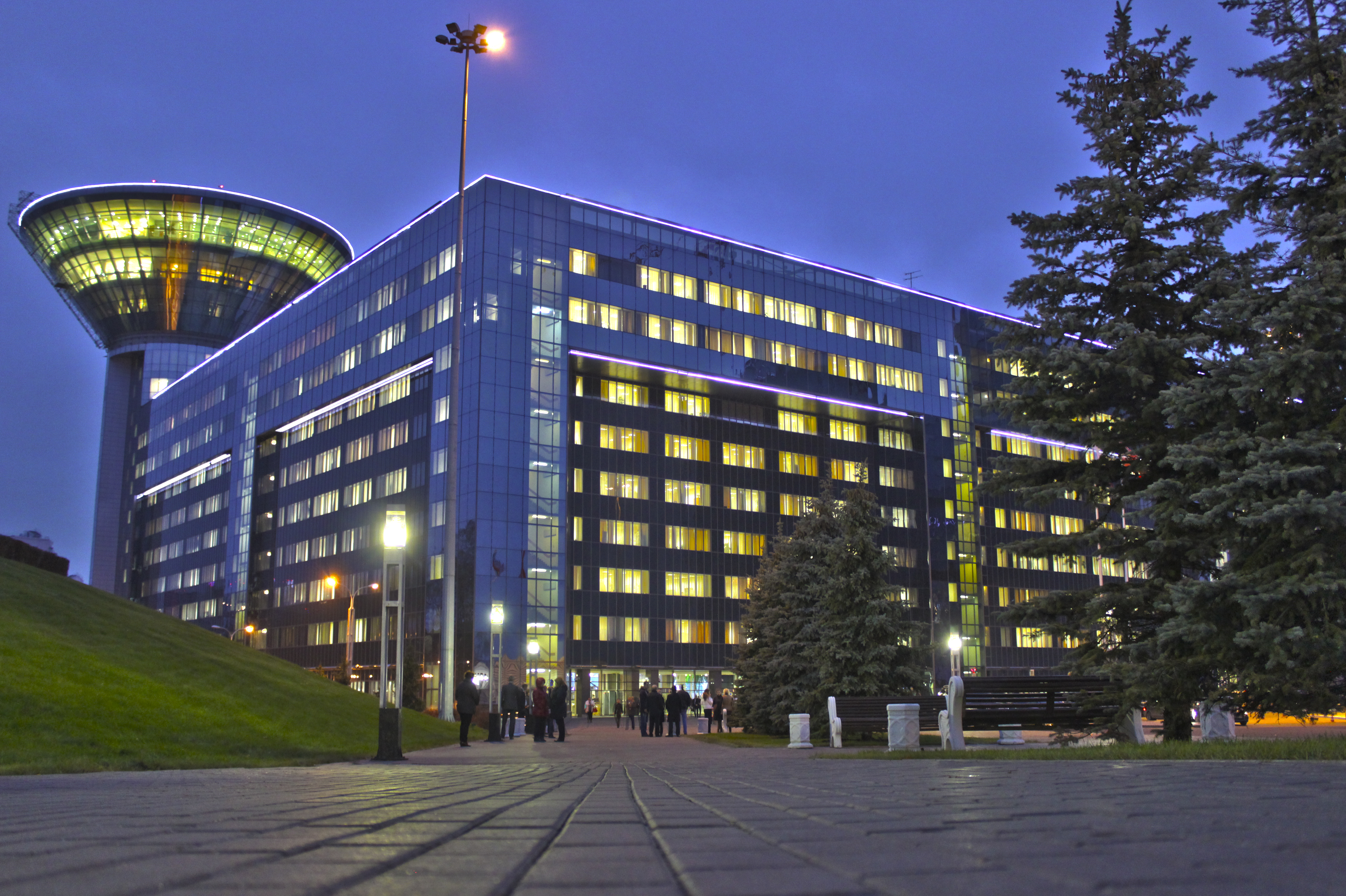 Дом Правительства Московской области